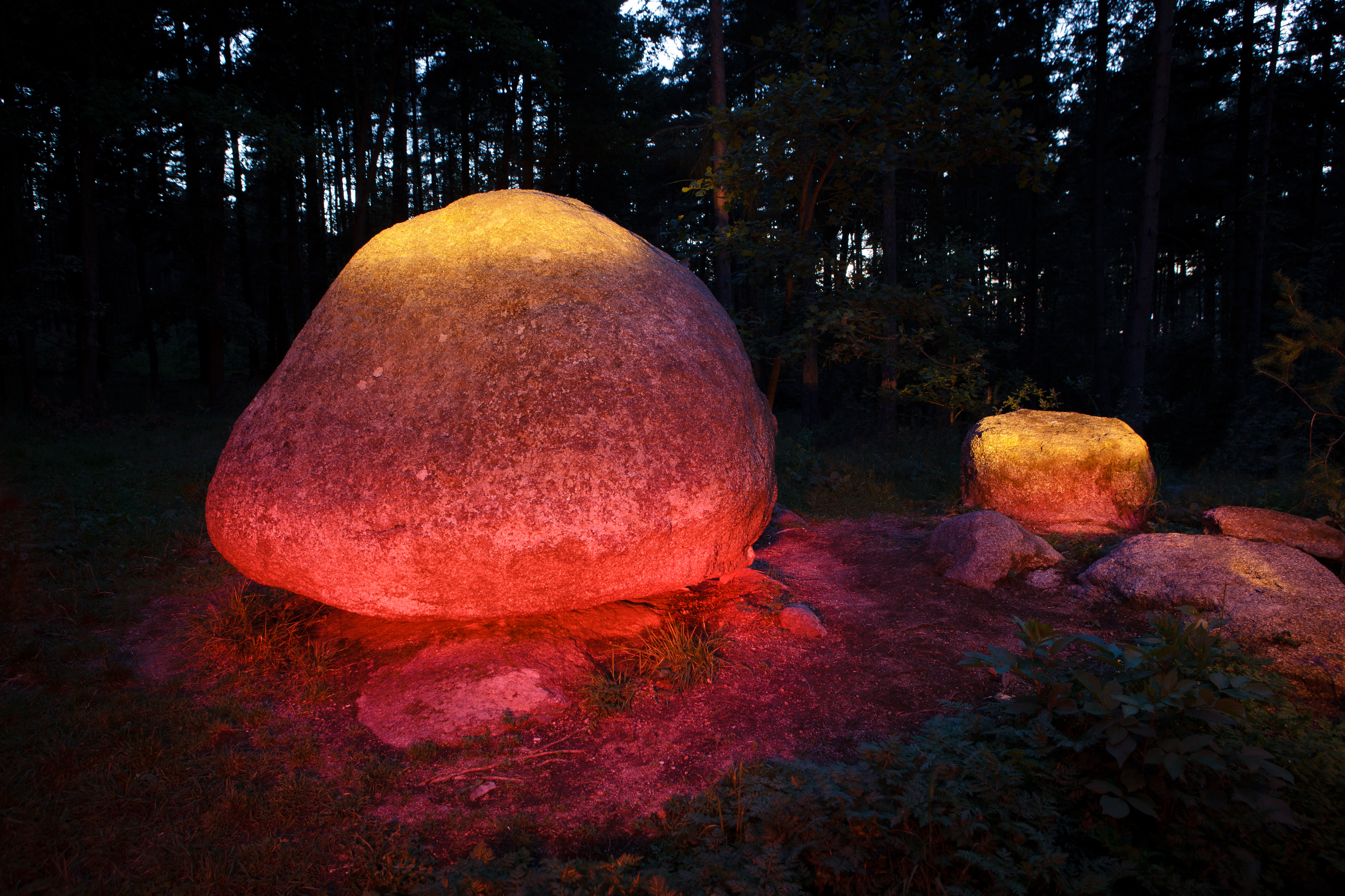 Výtvarná fotografie, luminografie. Jesenický viklan (Viklan u Jesenice nebo též Viklan u Jesenice u Rakovníka) nacházející se v blízkosti Jesenice u Rakovníka